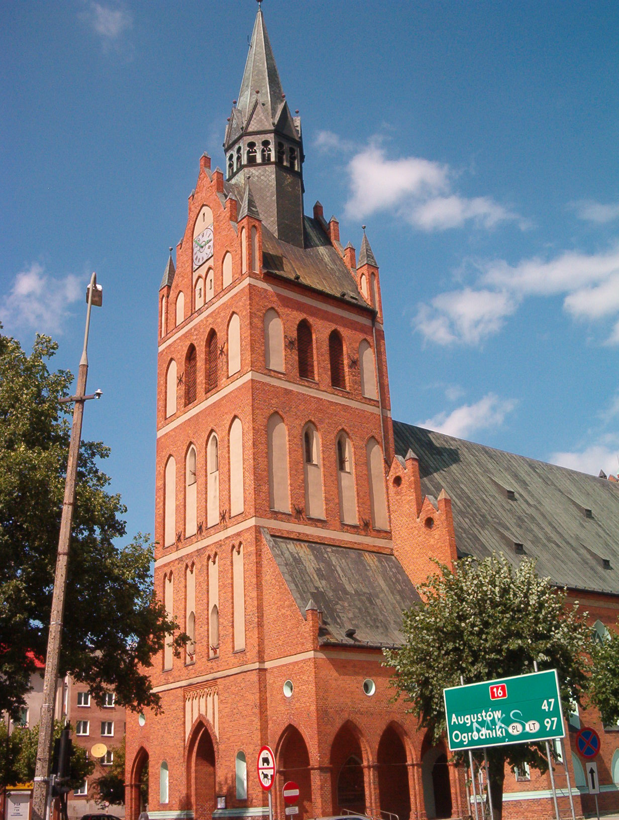 Lyck - Ełk - kościół Najświętszego Serca Pana Jezusa